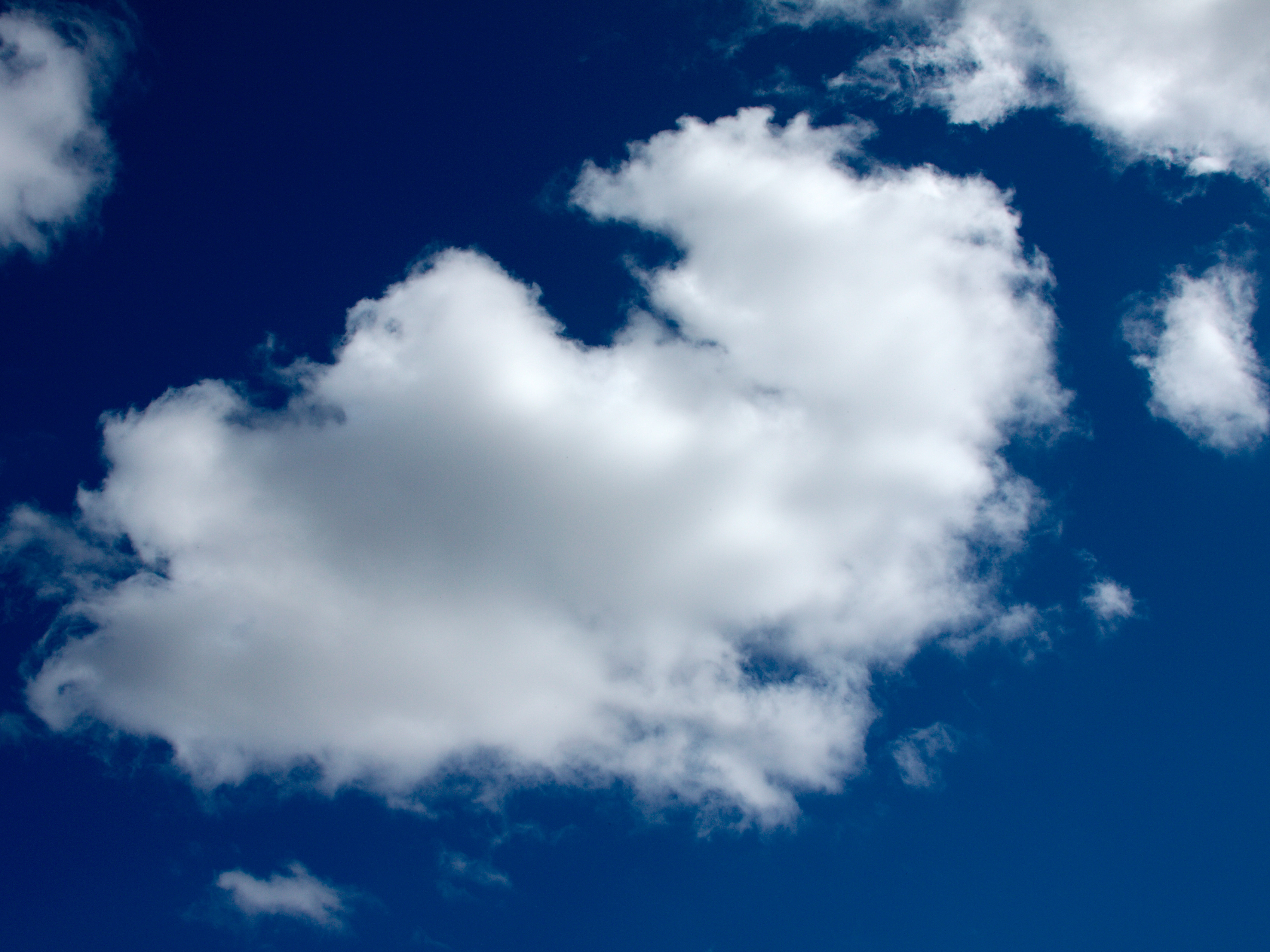 Kumulovitý mrak